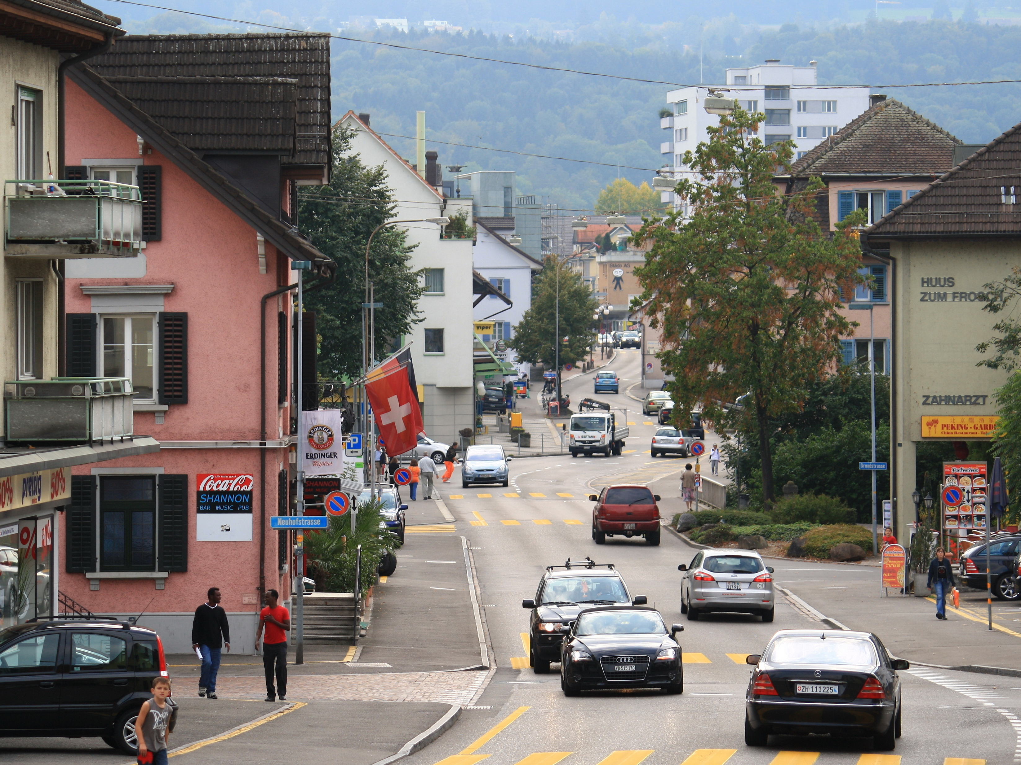 Bahnhofstrasse in Dübendorf (Switzerland) as seen from Bahnhof Dübendorf